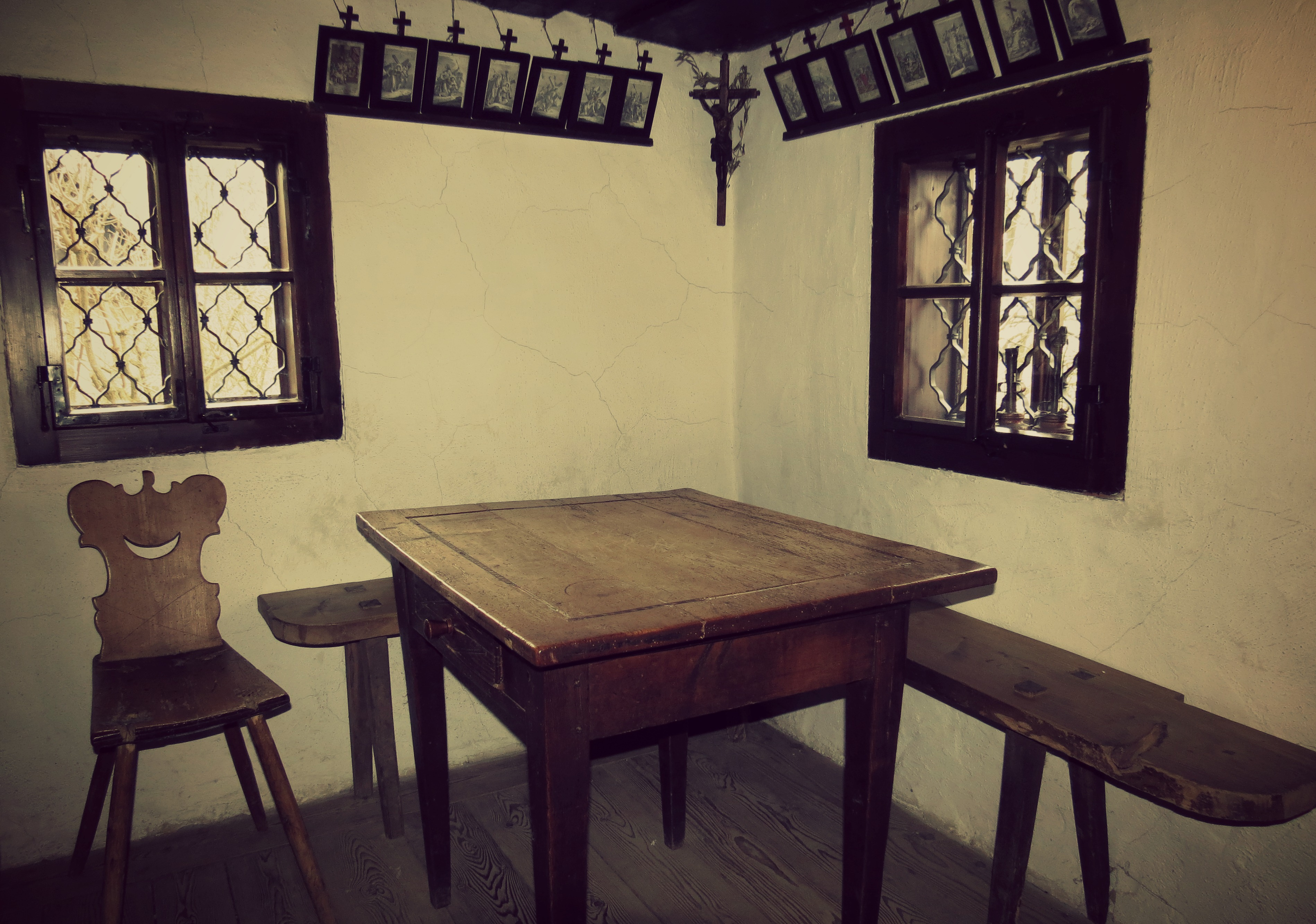 Notranjost Finžgarjeve rojstne hiše.